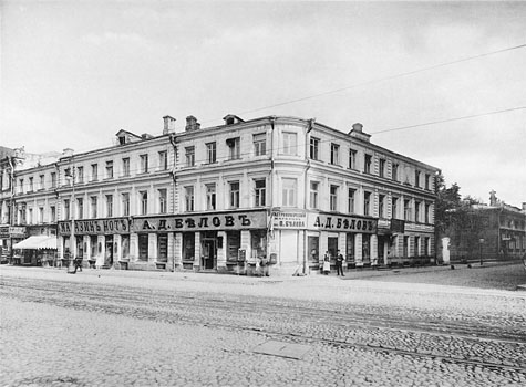 94. 6-й родильный прiютъ и школьная амбулаторiя въ д. бывш. Лопыревскаго на АрбатЪ. (Москва)